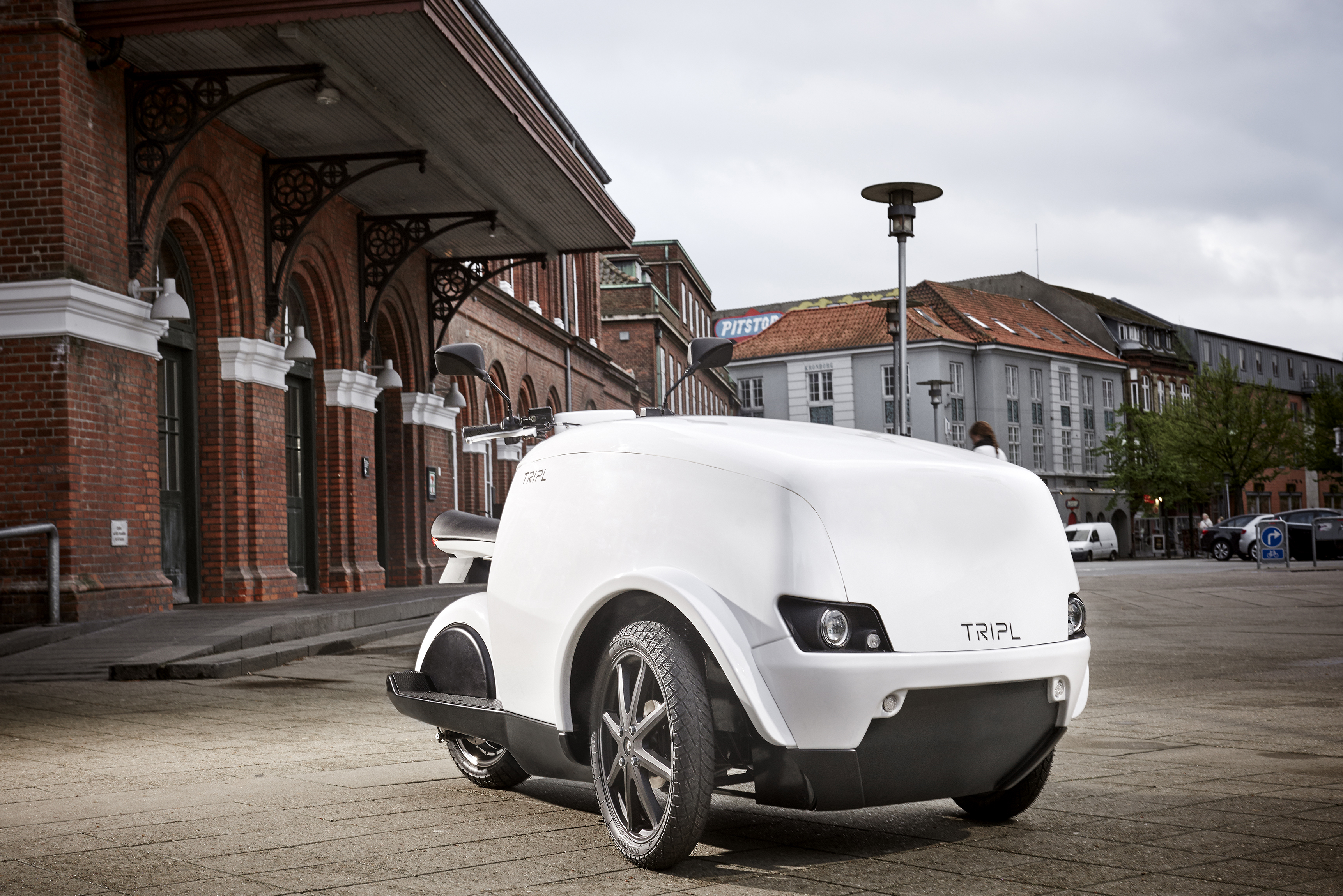 TRIPL Transportscooter